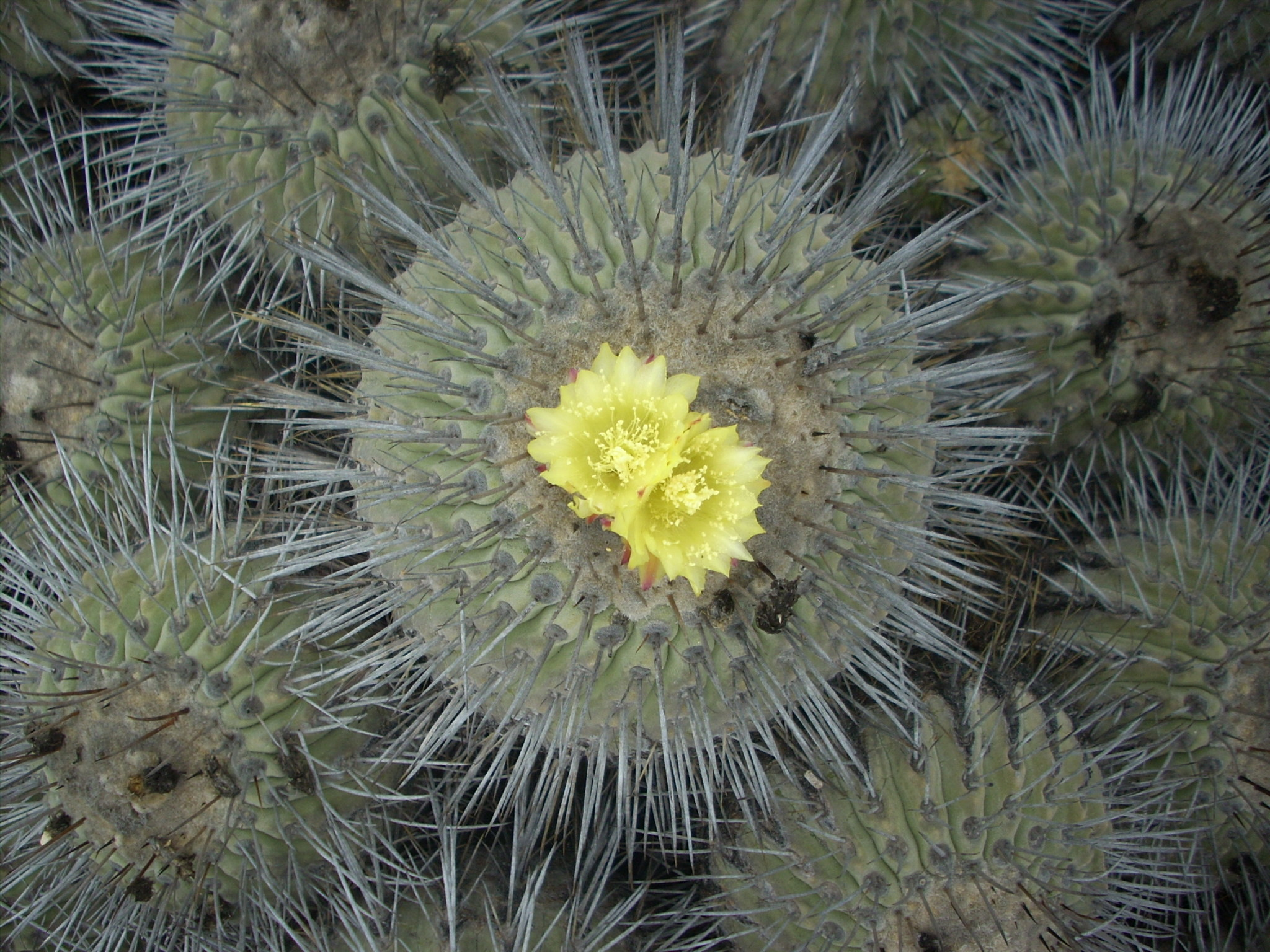 cectus con una bella flor amarilla en su centro, desierto florido